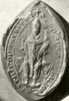 Türje nb. Fülöp esztergomi érsek pecsétje 1272-ben